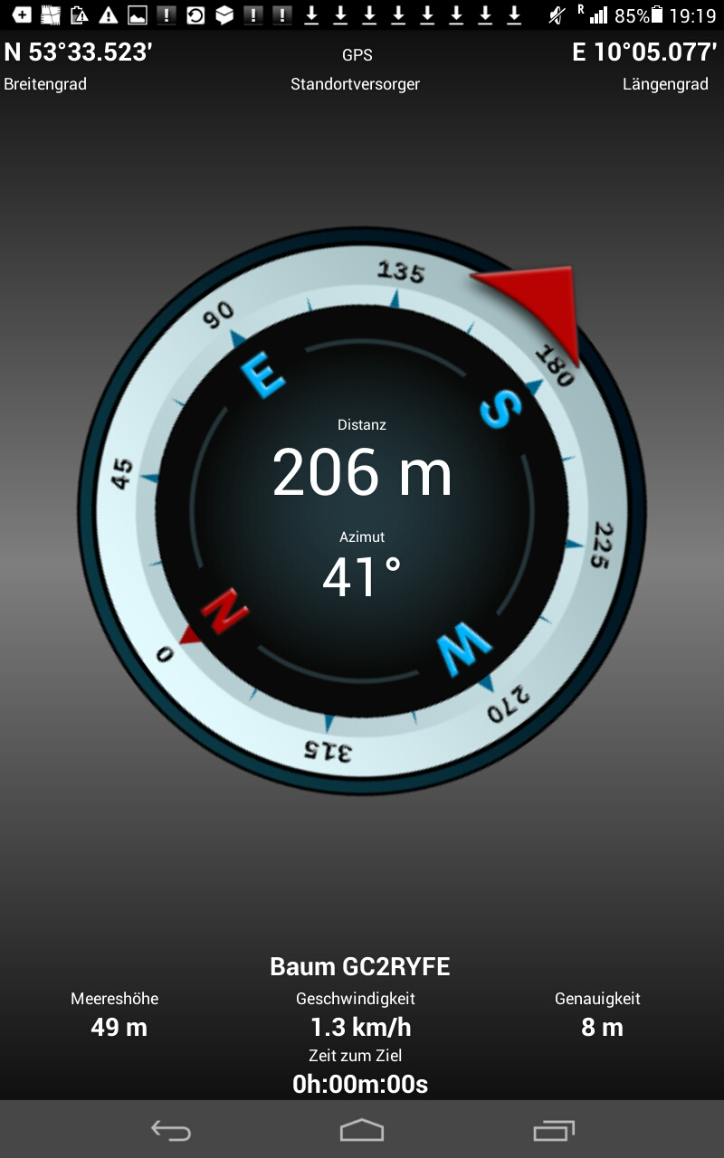 Wherigo-Cartridge_GC45K1D_vor_Ort_4